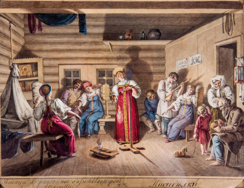 Крестьянские посиделки в России. ГейссЛер, Христиан Готтфрид (1770-1844). Акварель, гуашь, тушь, перо, бумага, около 1796 г. 21,5 x 27,8 см. Христиан Готфрид Гейсслер работал в России в 1790-1798 гг. Часть его акварелей этнографического содержания хранится в Русском музее в Санкт-Петербурге.